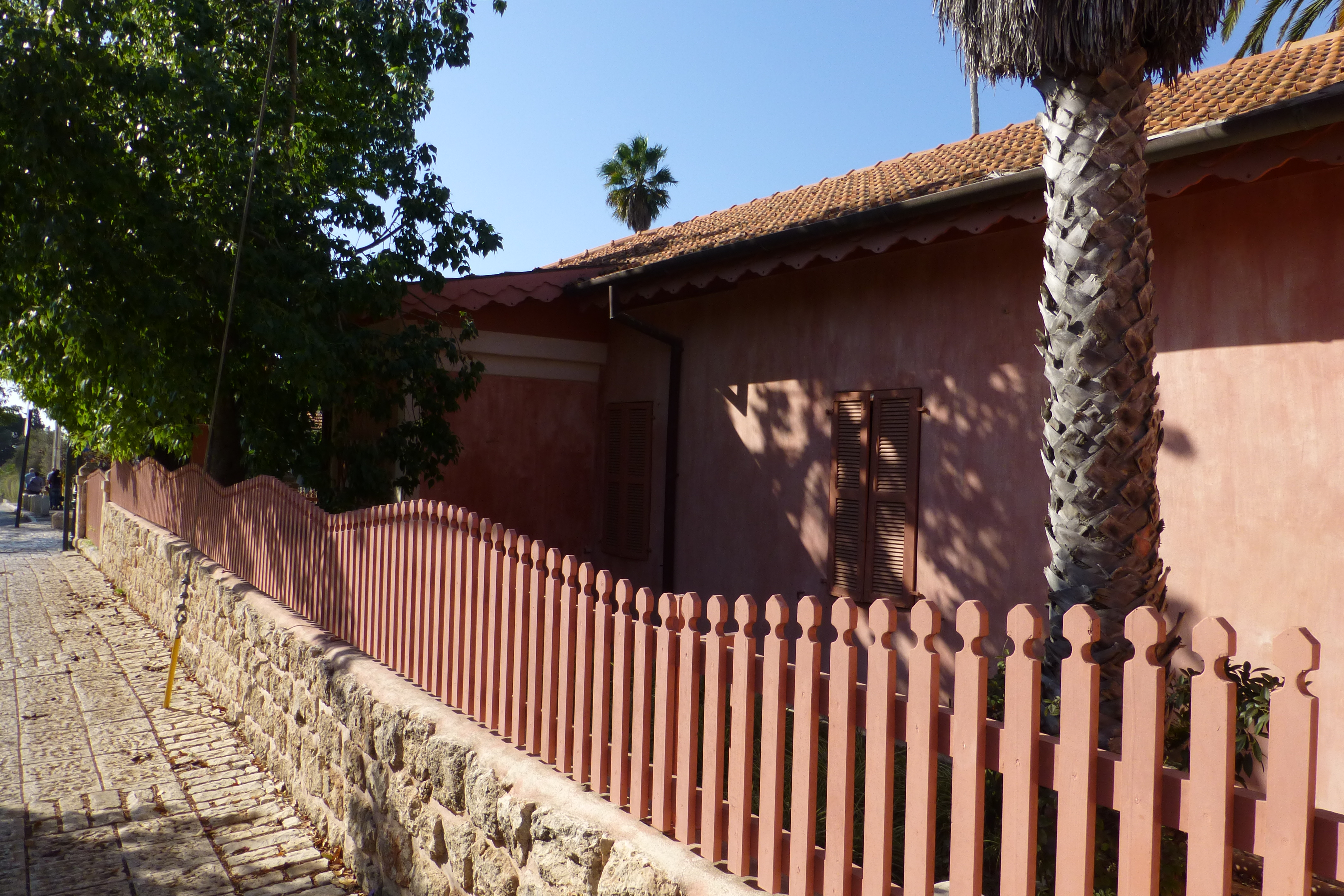 בית אהרנסון הוא ביתה של משפחת אהרנסון במושבה זכרון יעקב, שבו שוכן מוזיאון ניל"י מאז 1956. בבית התנהלו חיי משפחת אהרנסון מאז תקופת העלייה הראשונה, ובו התאבדה שרה אהרנסון, ממנהיגי מחתרת ניל"י לאחר שעונתה על ידי השלטונות העות'מאניים כאשר התגלתה המחתרת בשלהי מלחמת העולם הראשונה.